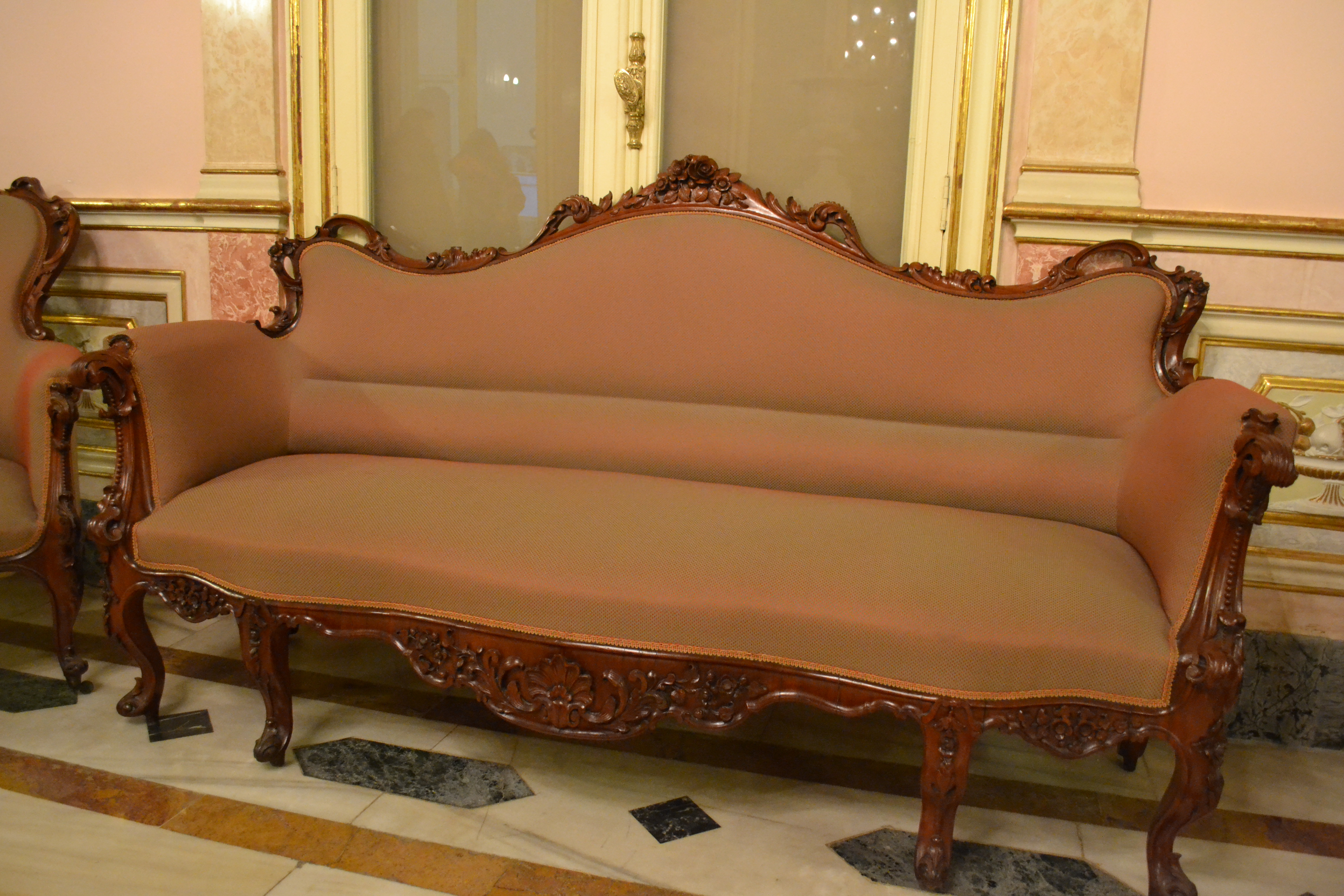 Sofá isabelino de pino y caoba, España, siglo XIX, CE3/00784; 3/00762-3/00771. Comedor del Palacio del marqués de Dos Aguas.